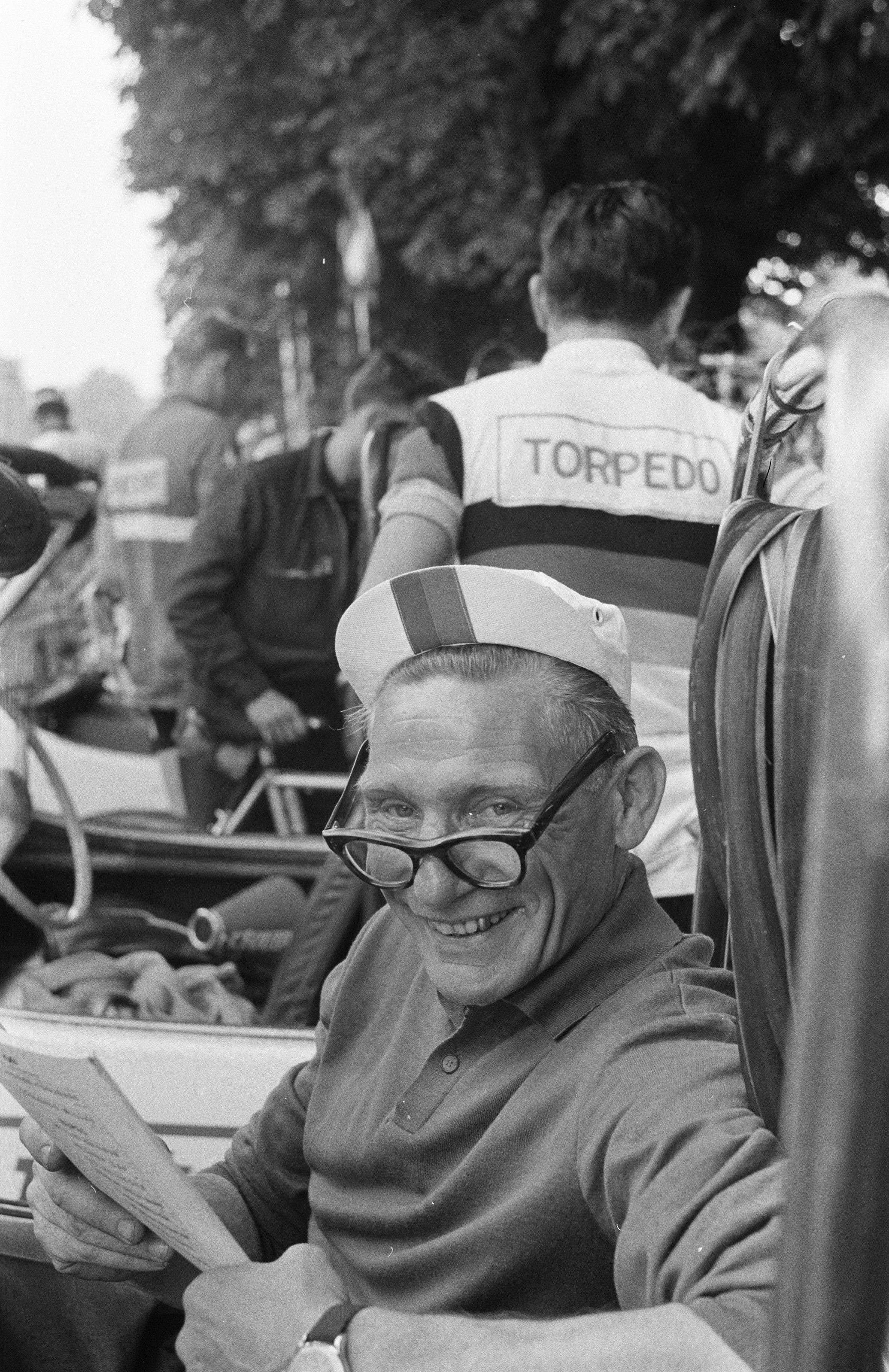 Collectie / Archief : Fotocollectie Anefo Reportage / Serie : [ onbekend ] Beschrijving : Tour de France , voor de start Buchly (Nederlandse ploegleider in leiderswagen) Datum : 7 juli 1960 Trefwoorden : sport, wielrennen Persoonsnaam : Buchly Instellingsnaam : Tour de France Fotograaf : Pot, Harry / Anefo Auteursrechthebbende : Nationaal Archief Materiaalsoort : Negatief (zwart/wit) Nummer archiefinventaris : bekijk toegang 2.24.01.05 Bestanddeelnummer : 911-3769